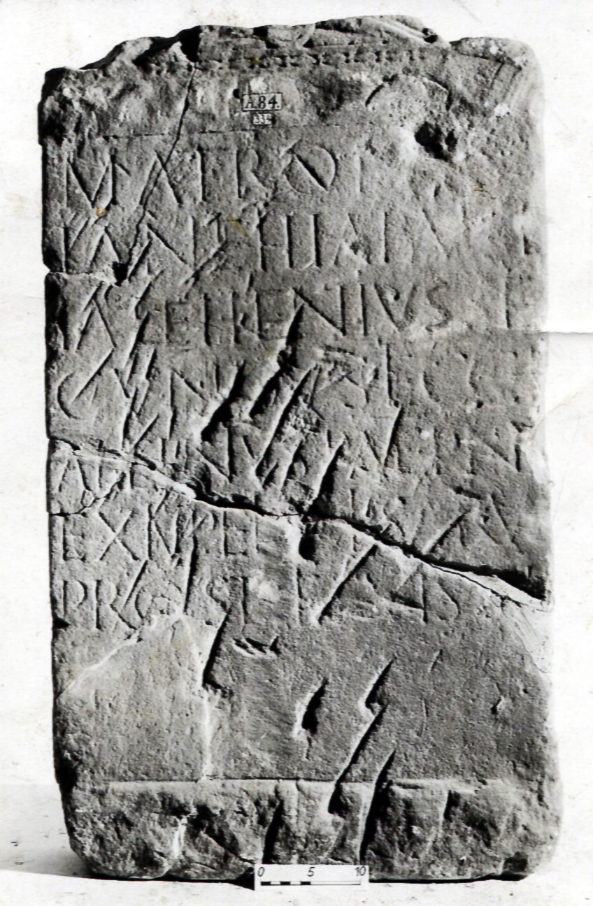 Lechenich, Matronenstein. Weihestein der Matronen „Lanehiae“, um 200 n. Chr. errichtet von „Lucius Jalehenius secundus“. Der Matronenstein wurde Mitte des 19. Jahrhunderts auf dem alten Friedhof Lechenichs an der Erper Straße gefunden. Er war als Grababdeckung benutzt worden. Der obere Teil war zerstört, die Beschriftung des unteren Teils war erhalten.